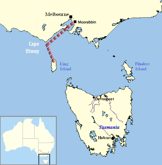 Bass-Straße, selbst erstellt mit OMC